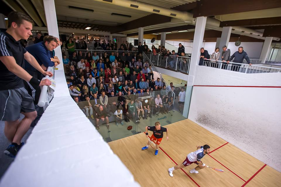 Centercourt Sportwerk (Bundesliga-Begegnung zwischen Tom Richards und Daryl Selby in der Saison 2014/2015 (Squash Walddörfer gegen Paderborner SC)